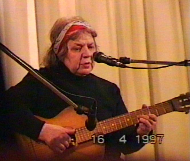 Novella Nikolajevna Matvejevová